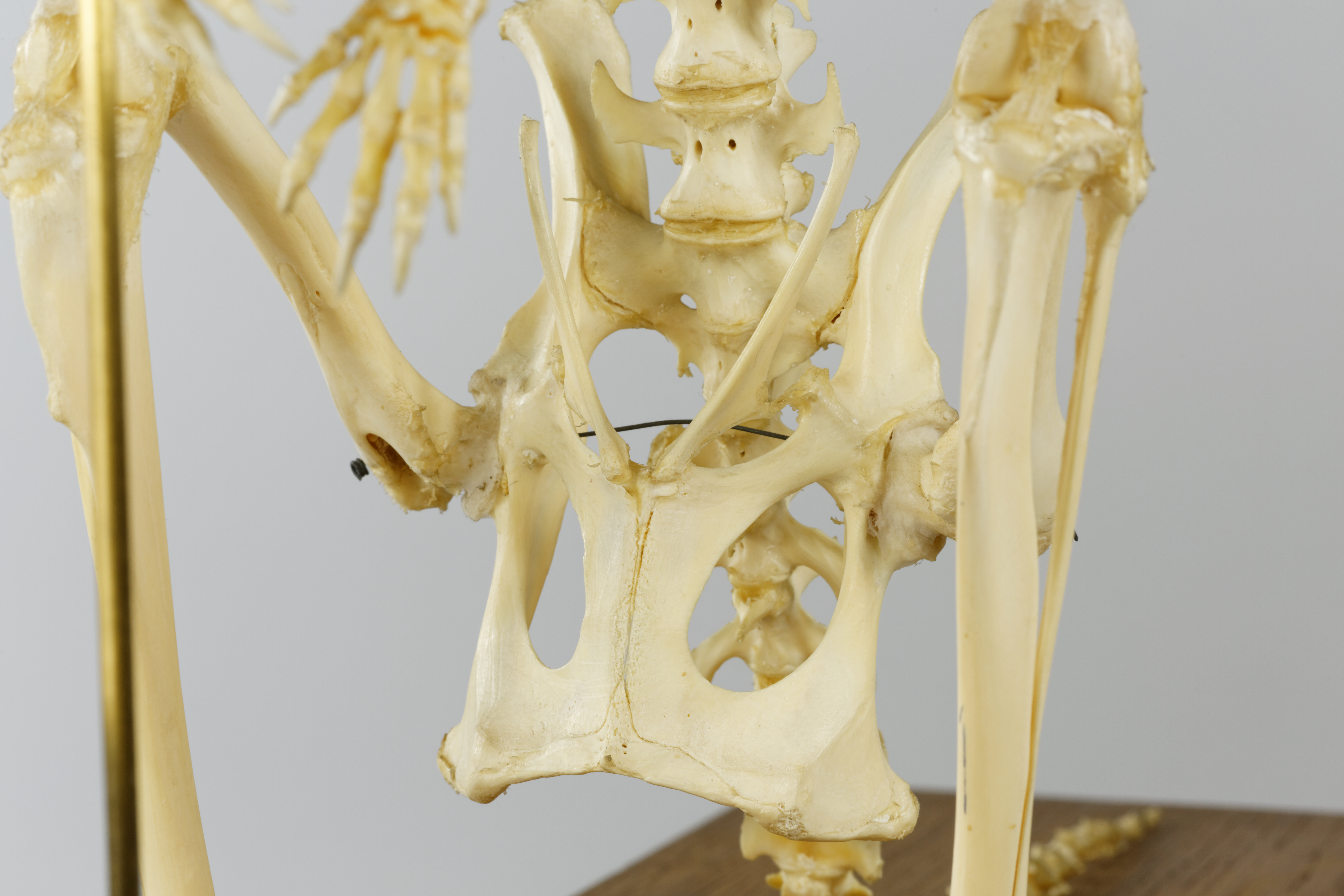 Un wallaby à cou rouge ou de Bennett - Macropus rufogriseus - de la collection de l'Université Pierre-et-Marie-Curie à Paris.